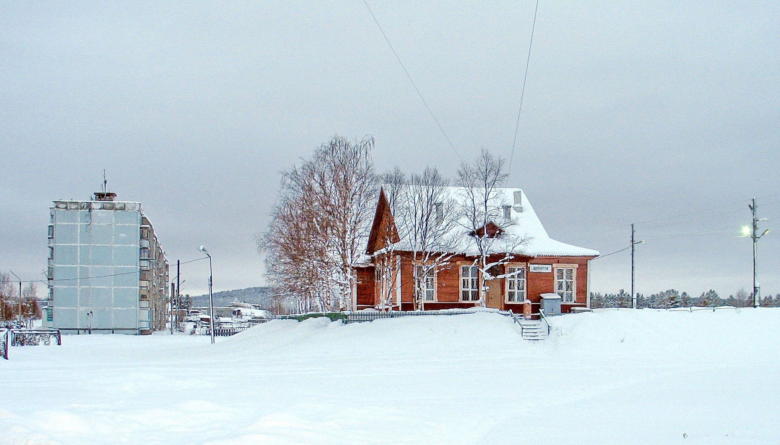 Поселок Алакуртти, Мурманская область